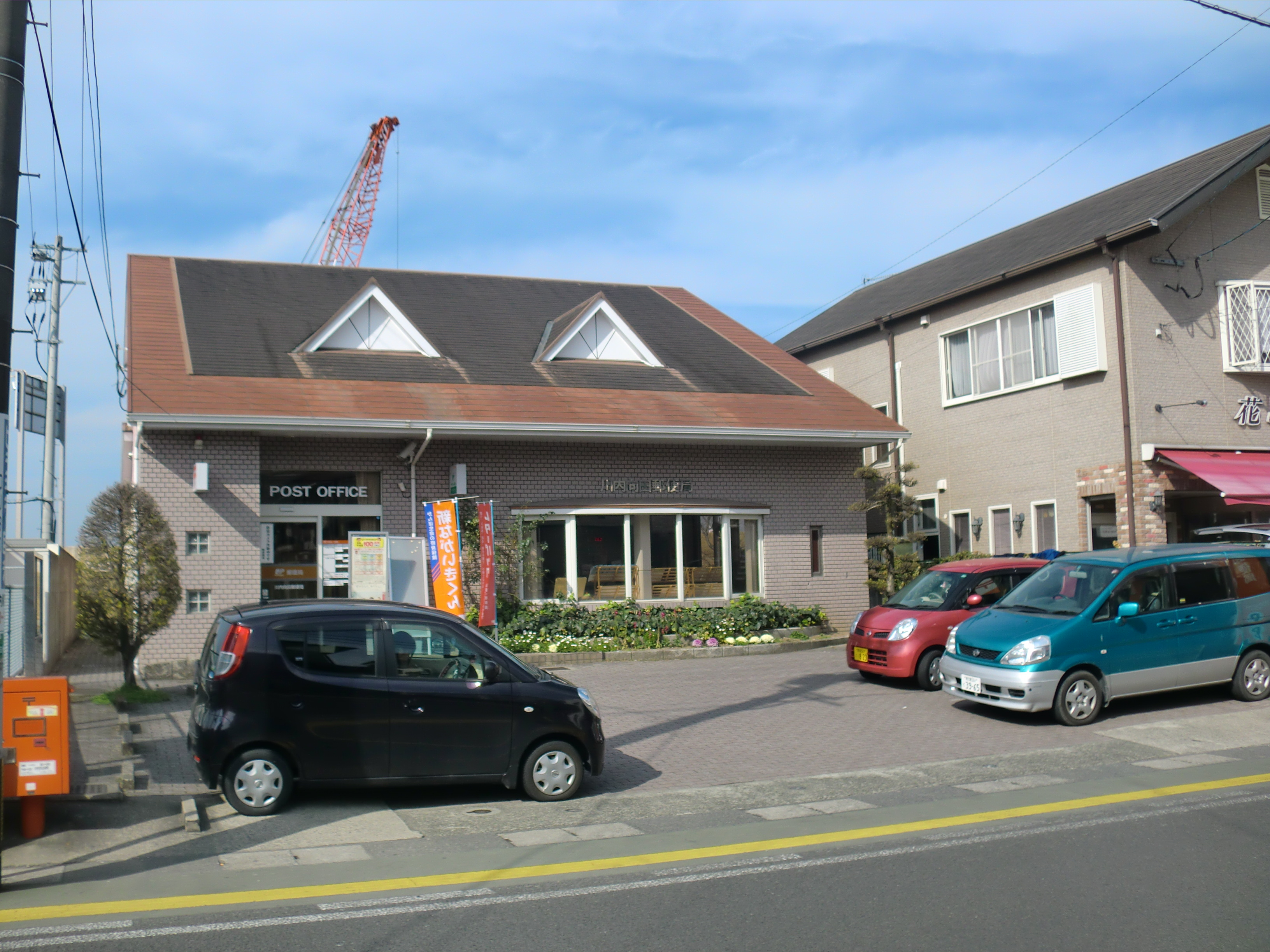 薩摩川内市にある川内向田（せんだいむこうだ）郵便局